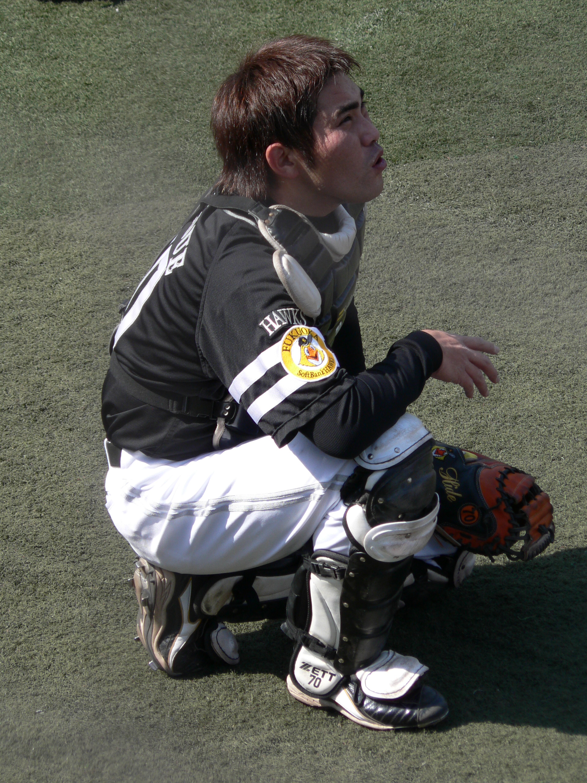 田上秀則。2009年3月12日、横浜スタジアムにて撮影。